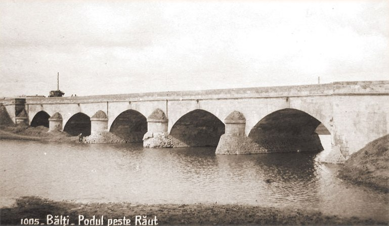 Podul peste râul Răut din Bălţi, până în prezent nu s-a păstrat.